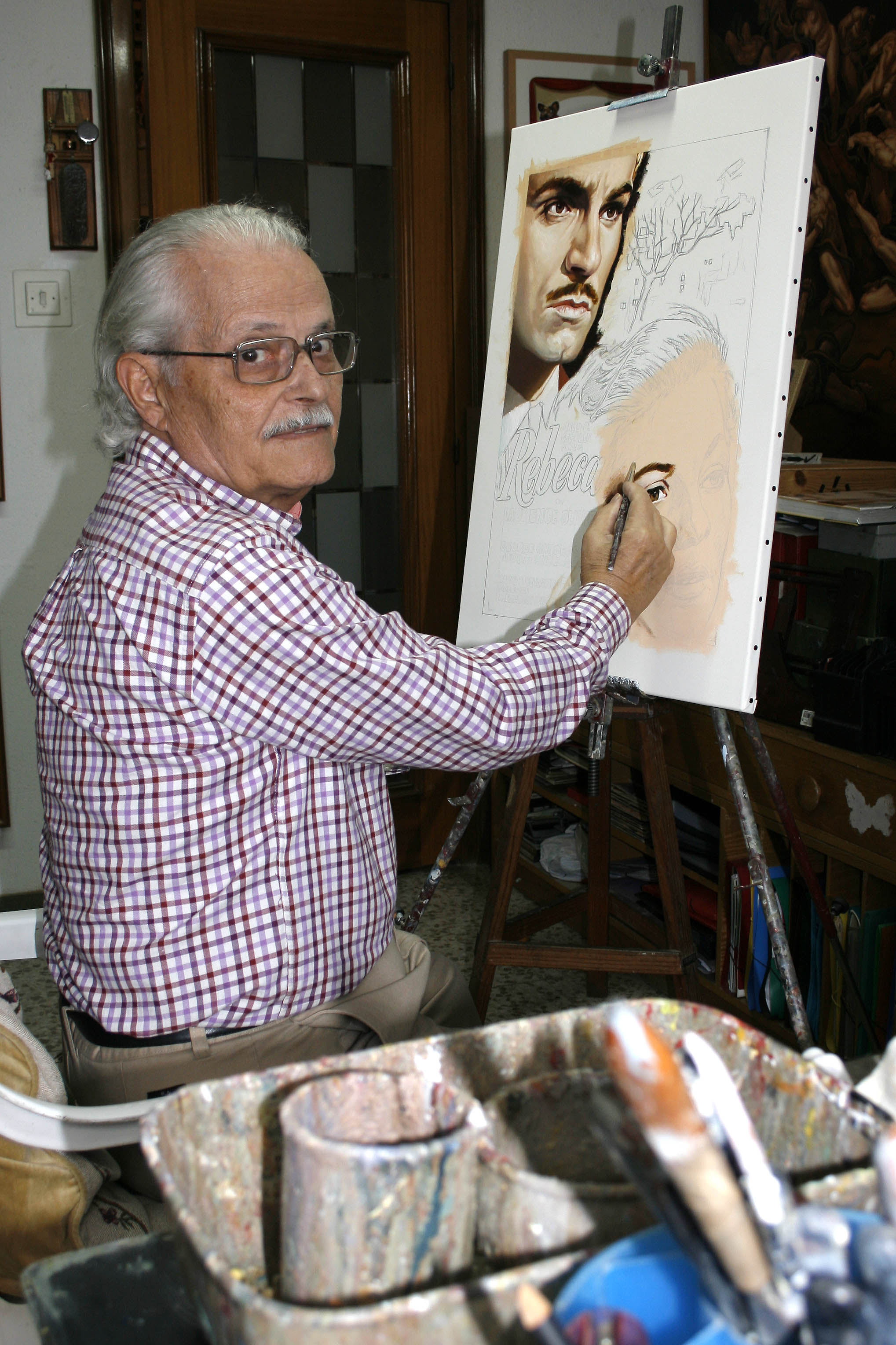 Macari al seu estudi de pintura